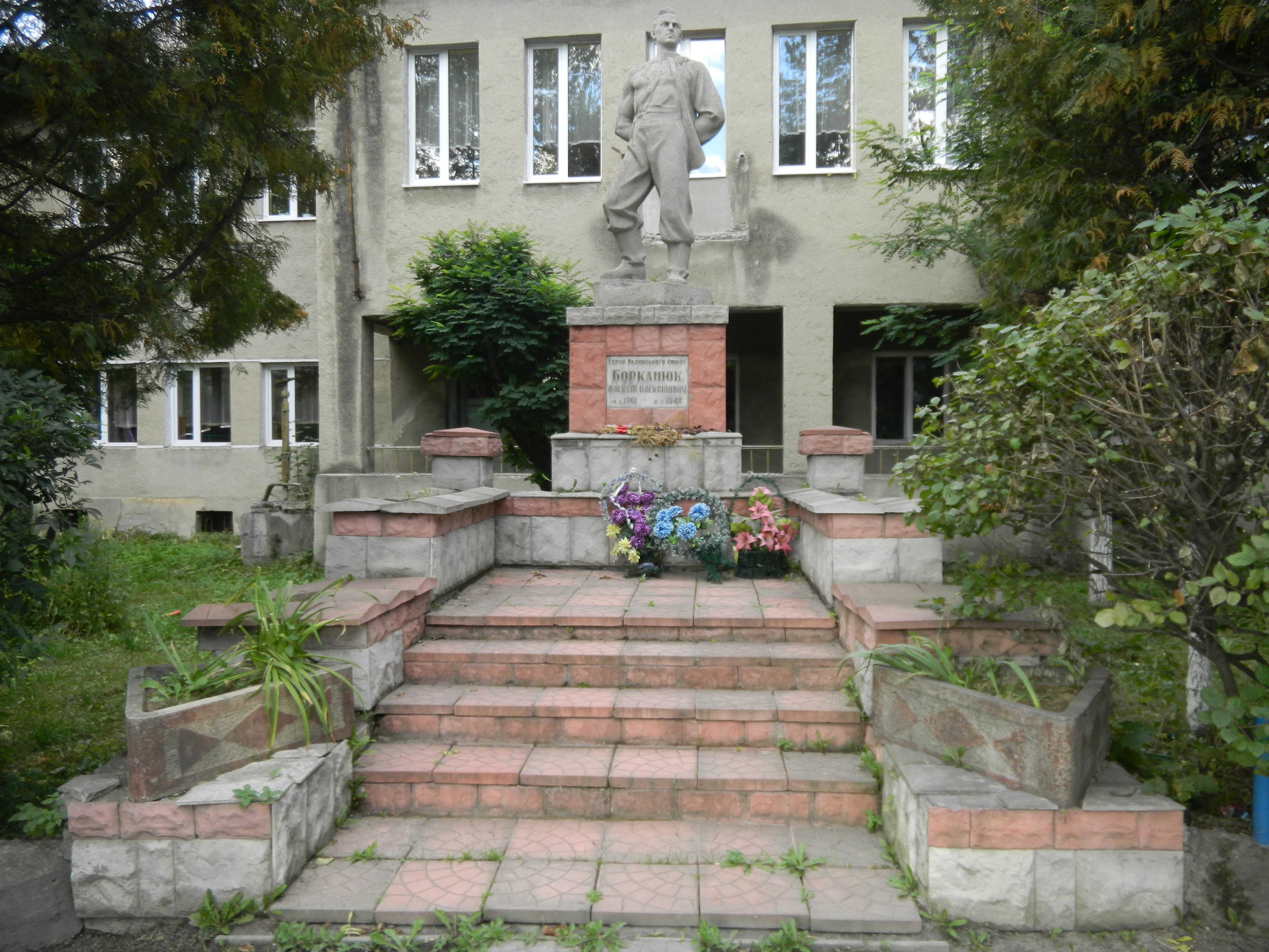 Пам'ятник О.Борканюку (Ясіня)